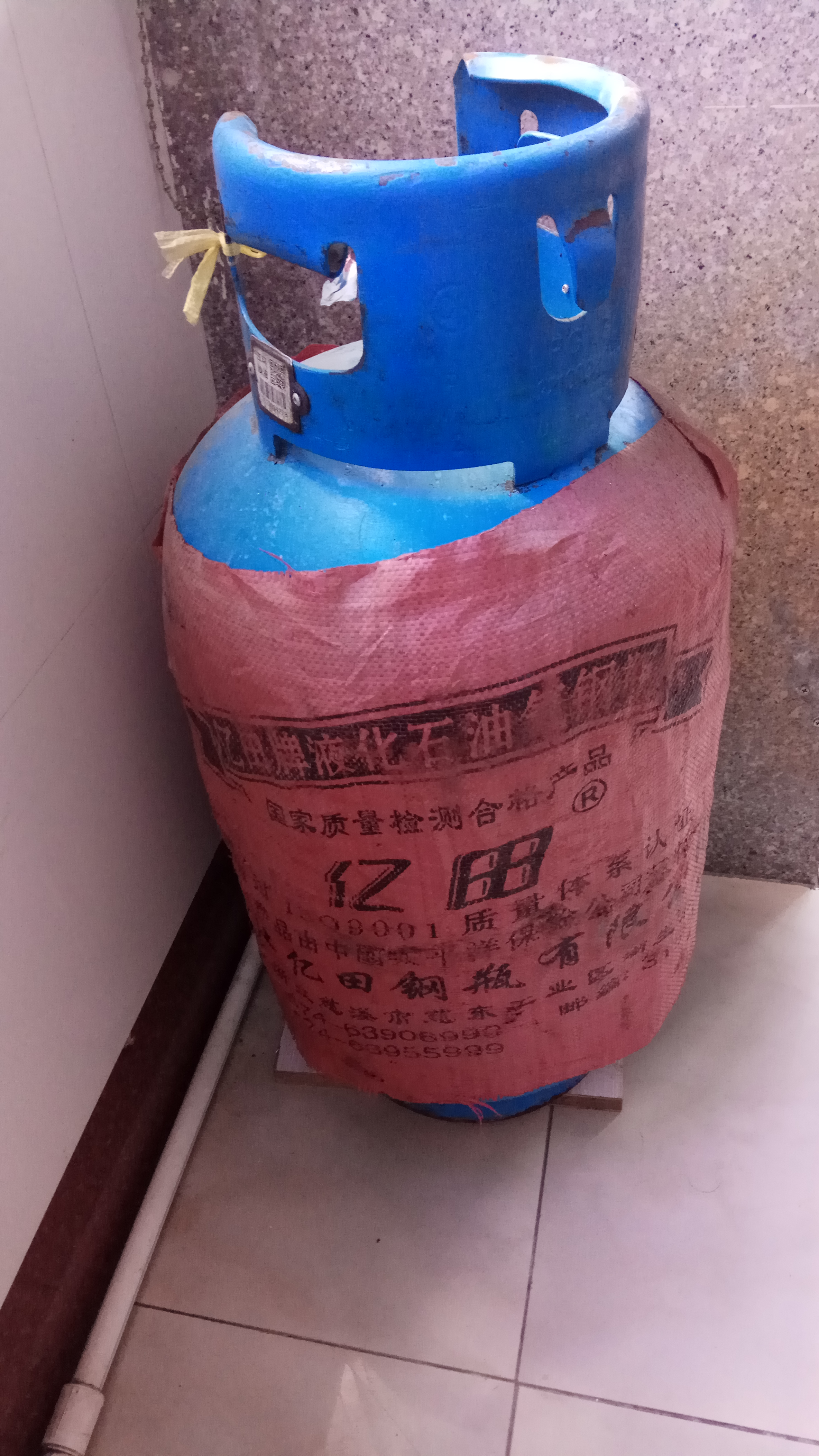 中文（中国大陆）: 一只液化石油气钢瓶